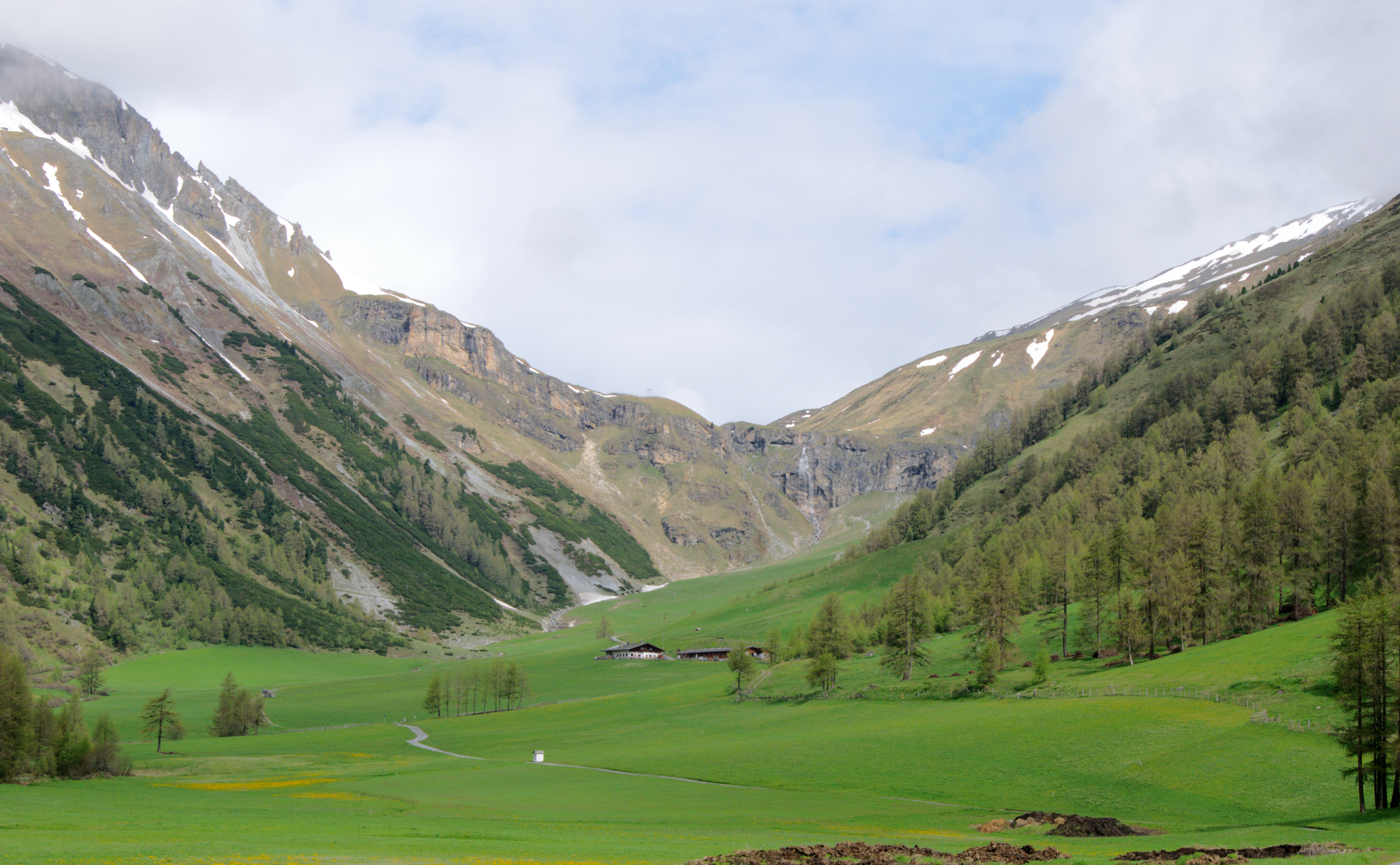 Schlinigtal oberhalb der Ortschaft Schlinig, Vinschgau, Italien